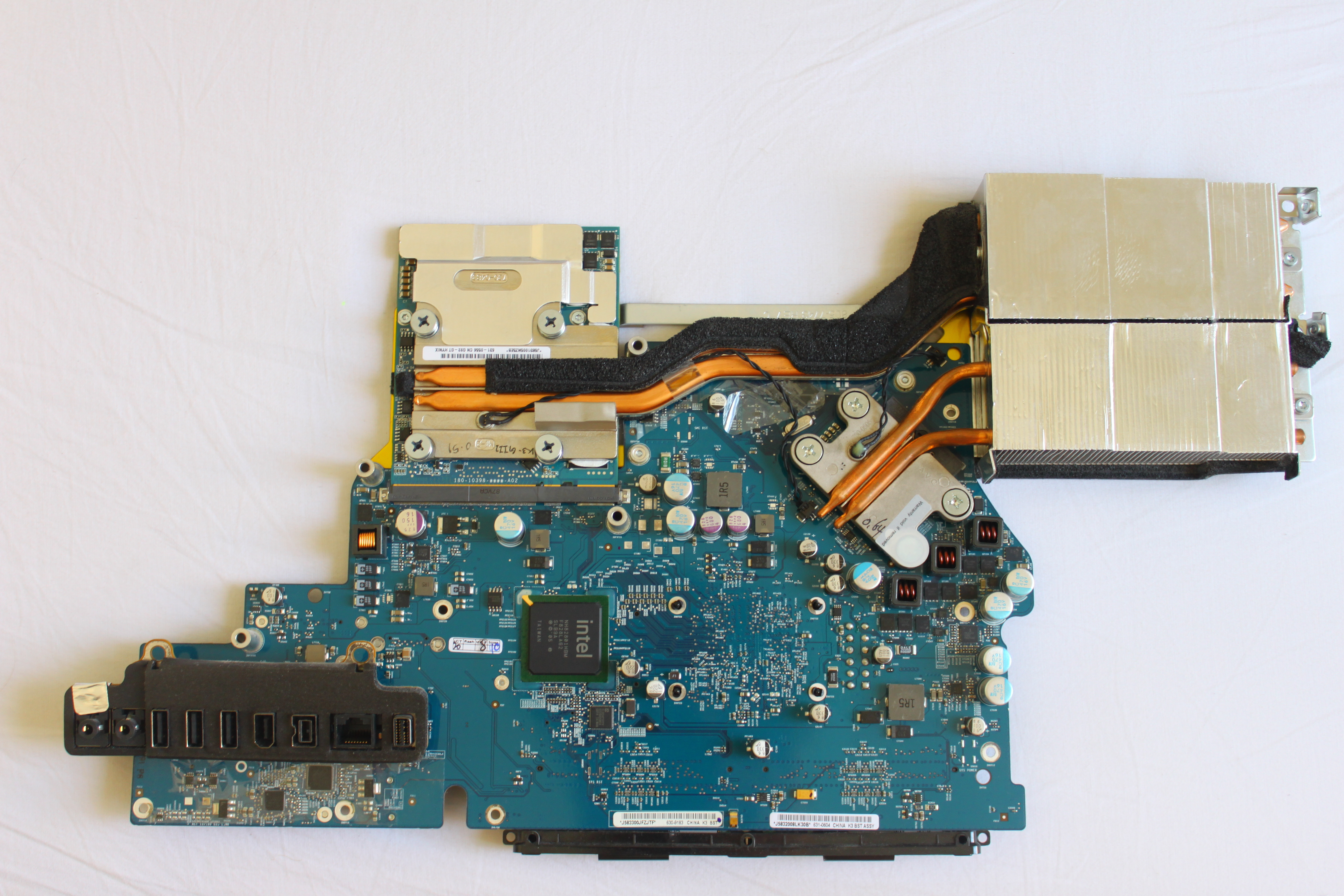 Carte mère d'un iMac early-2008